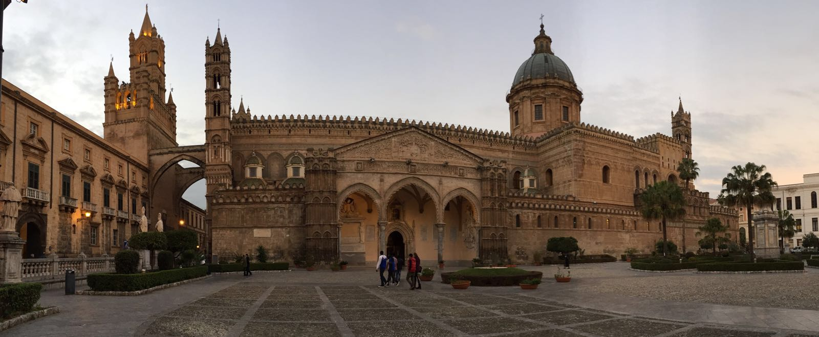 Scattata da Giorgia Esposito il 02 febbraio 2016.